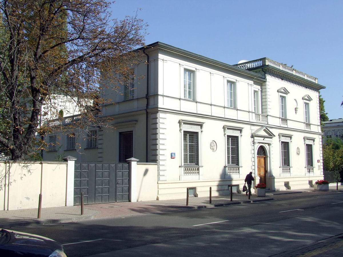 Pałacyk W. E. Raua - ambasada Szwajcarii w Warszawie